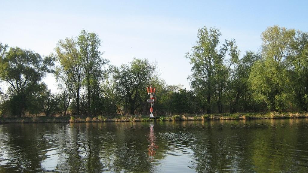 die Havel bei Deetz (Groß Kreutz) (Brandenburg, Germany)